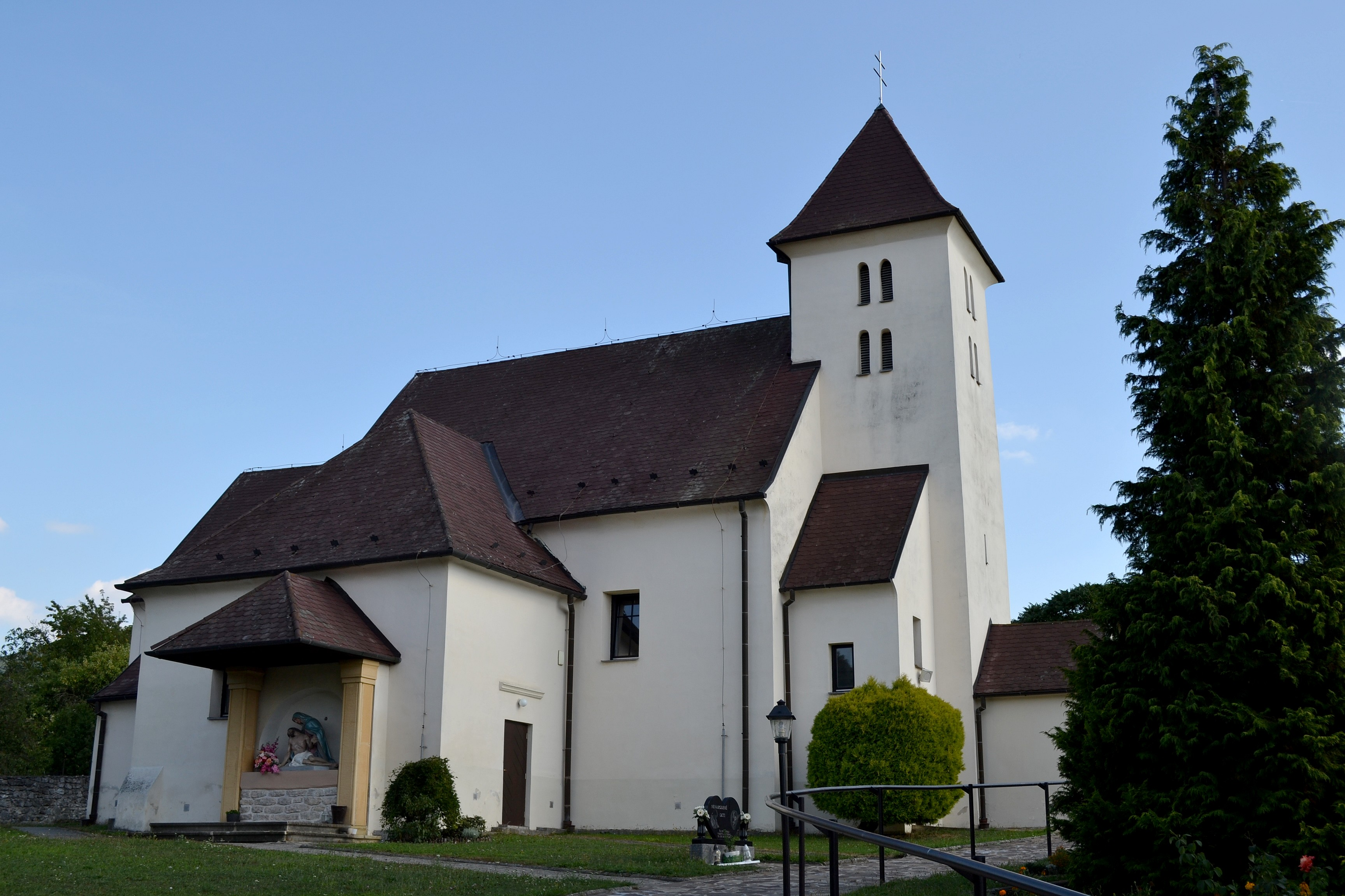 Soblahov (okr. Trenčín), Kostol svätého MIkuláša; celkový pohľad